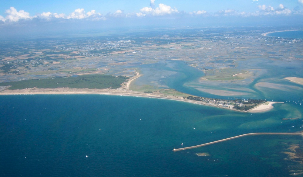 Pen-Bron